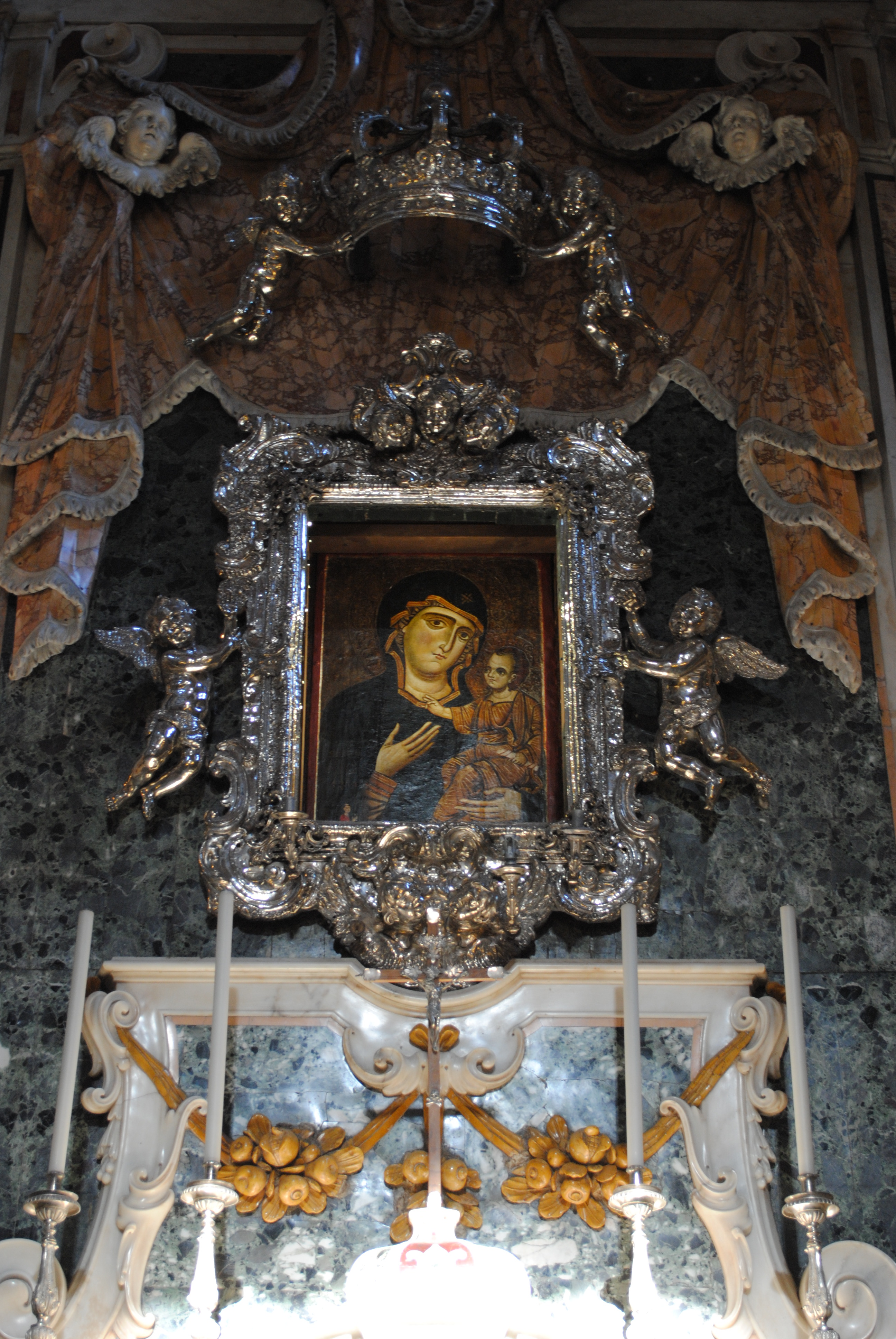 Madonna della Madia in Cattedrale